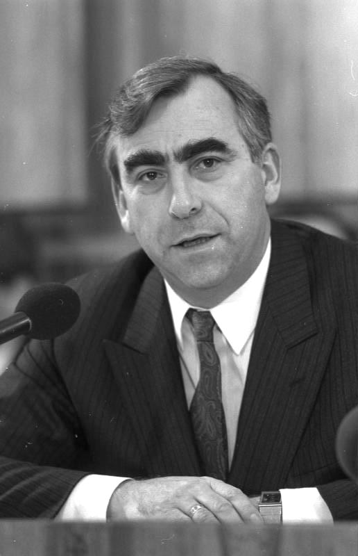 12.2.1987 Pressekonferenz der Generalsekretäre der CDU, Dr. Heiner Geißler, und FDP, Dr. Helmut Hausmann, sowie des Vorsitzenden der CSU-Landesgruppe im Deutschen Bundestag, Dr. Theodor Waigel, zu den Ergebnissen der zweiten Runde der Koalitionsverhandlungen (Wirtschafts- und Finanzpolitik, Sozial- und Familienpolitik) - im Saal der Bundespressekonferenz